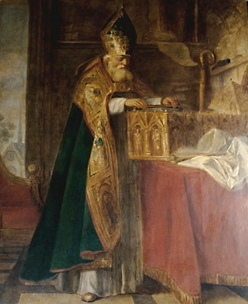 Tableau - Saint Ouen plaçant dans une châsse les reliques de saint Éloi.